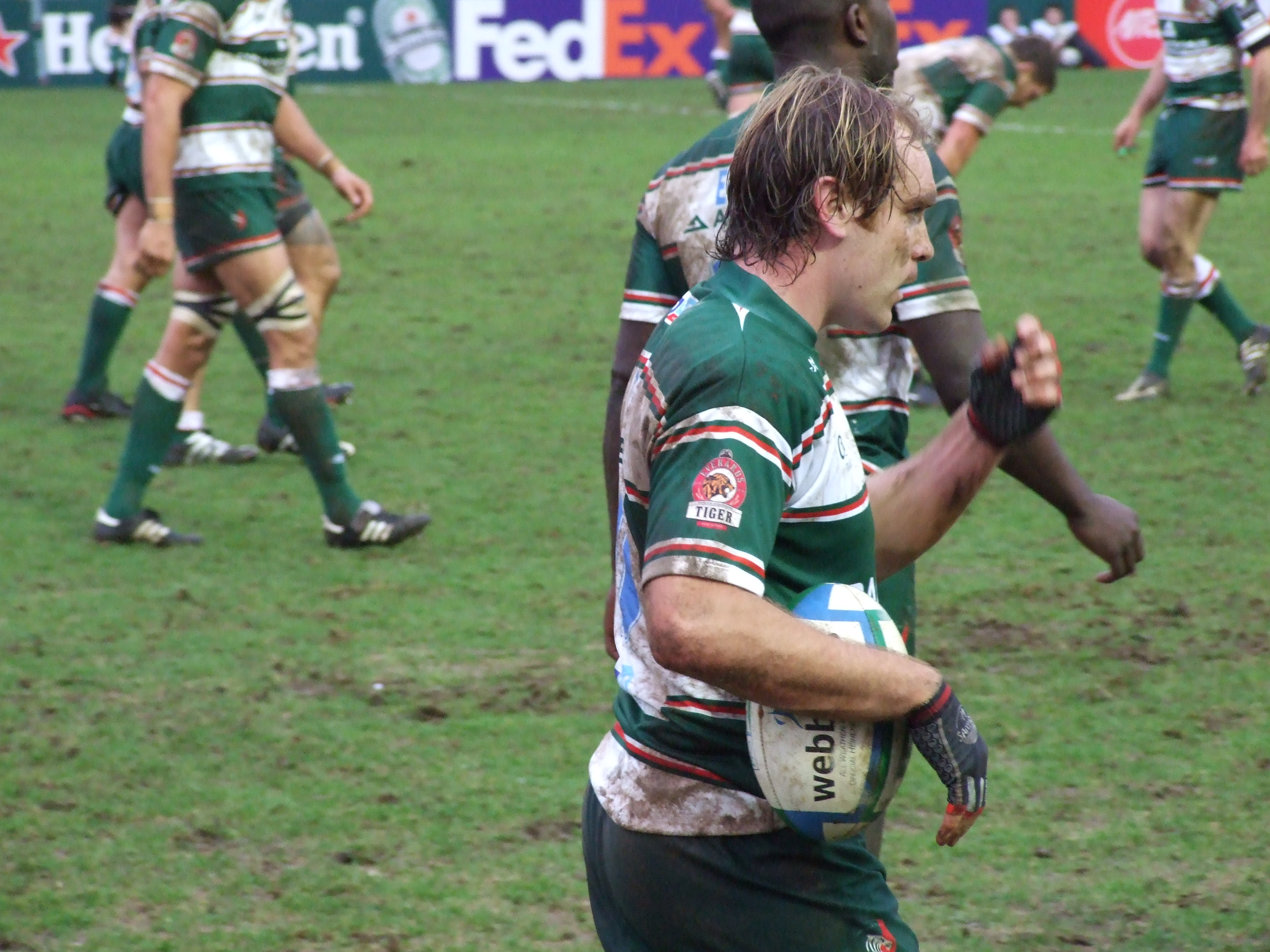 Leicester Tigers v Leinster - 19 January 2008 (64) - Andy Goode - Poule 6 6°journée Heineken Cup - Welford Road, Leicester Leicester Tigers 25 - 9 Leinster